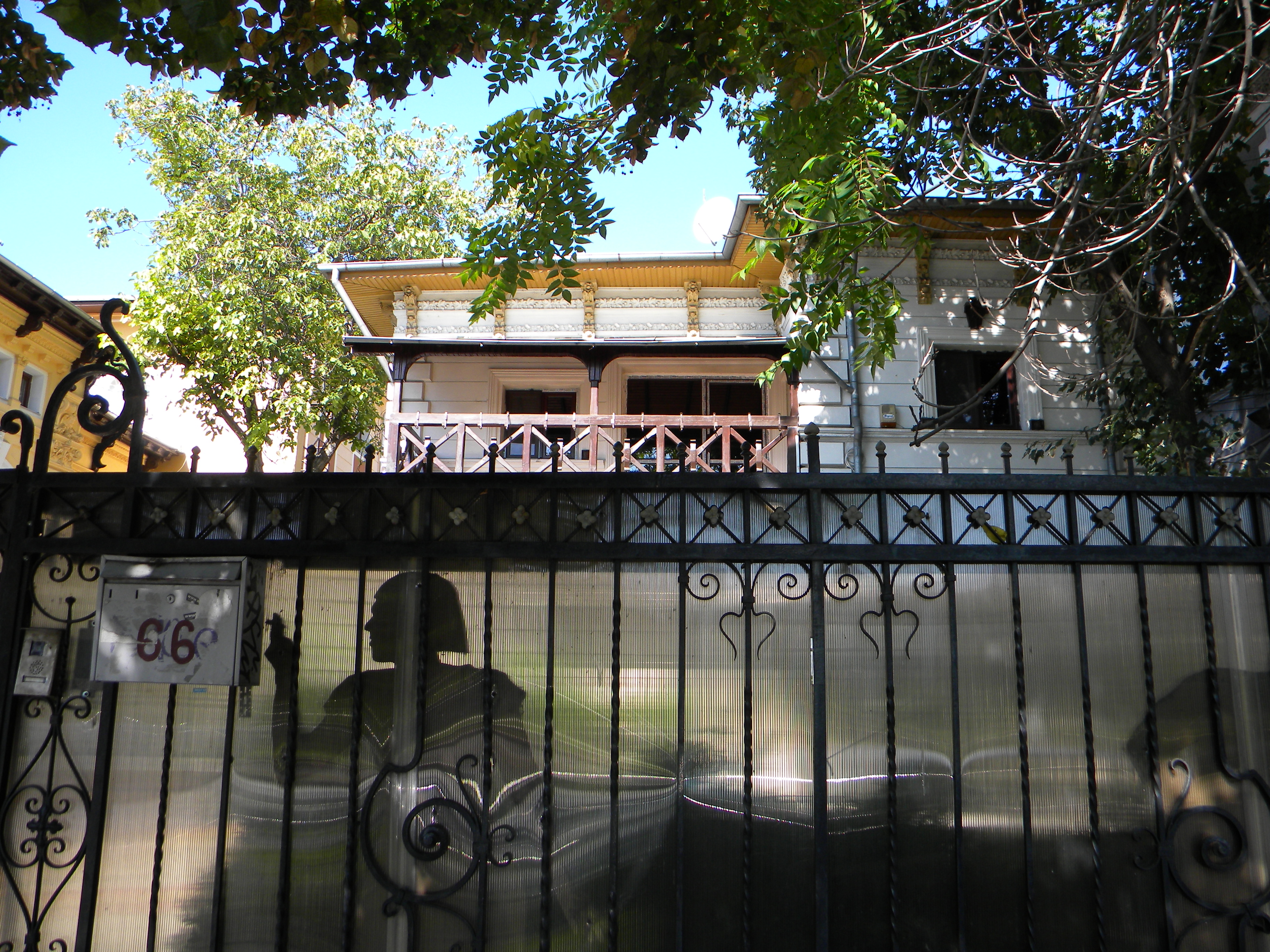 Bucuresti, Romania, Splaiul Independentei nr. 66 (Casa); B-II-m-B-18943 (3)